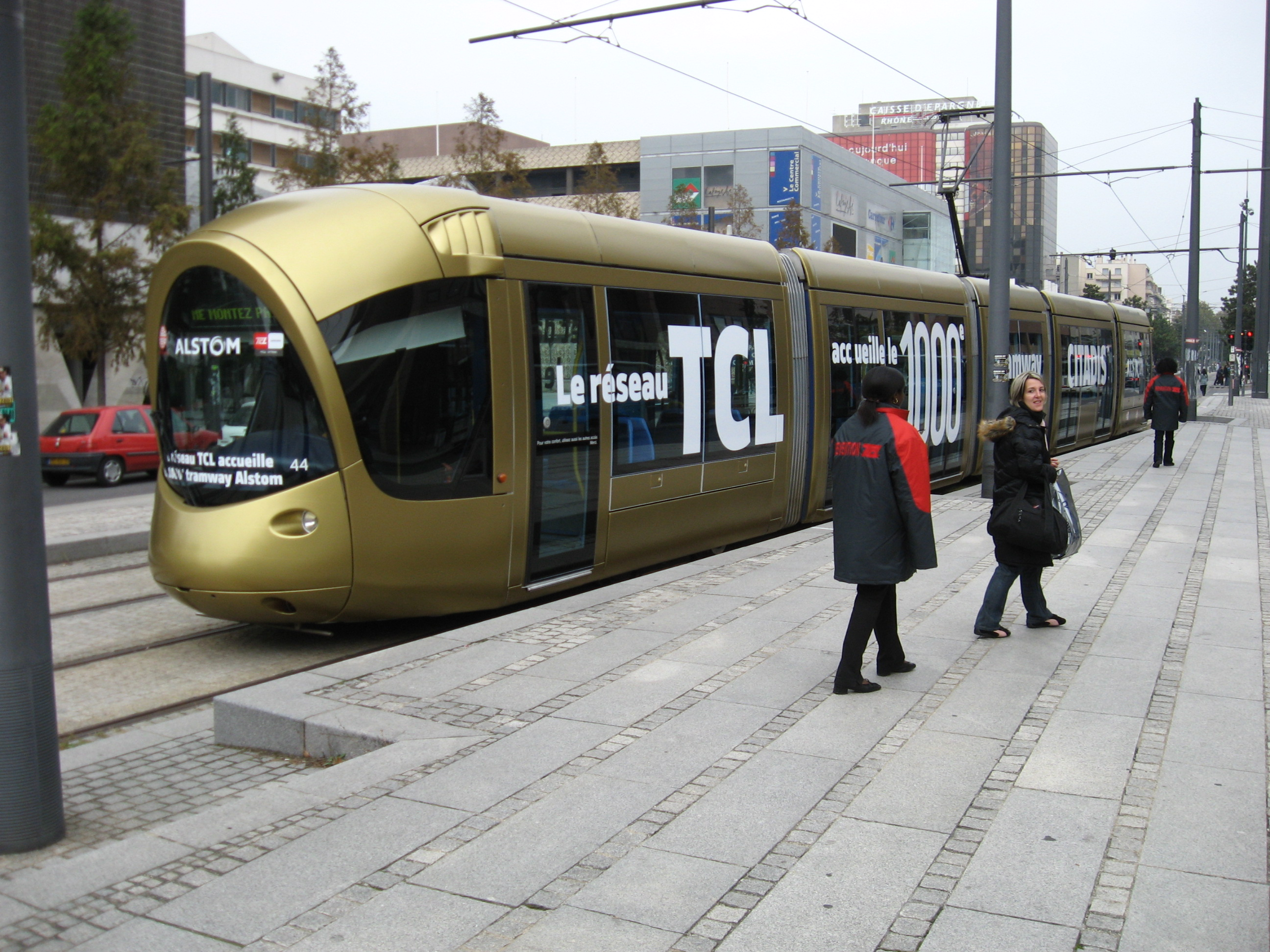 The 1000th citadis tram was delivered in gold metallic livery to the TCL tramnetwork in 2008.